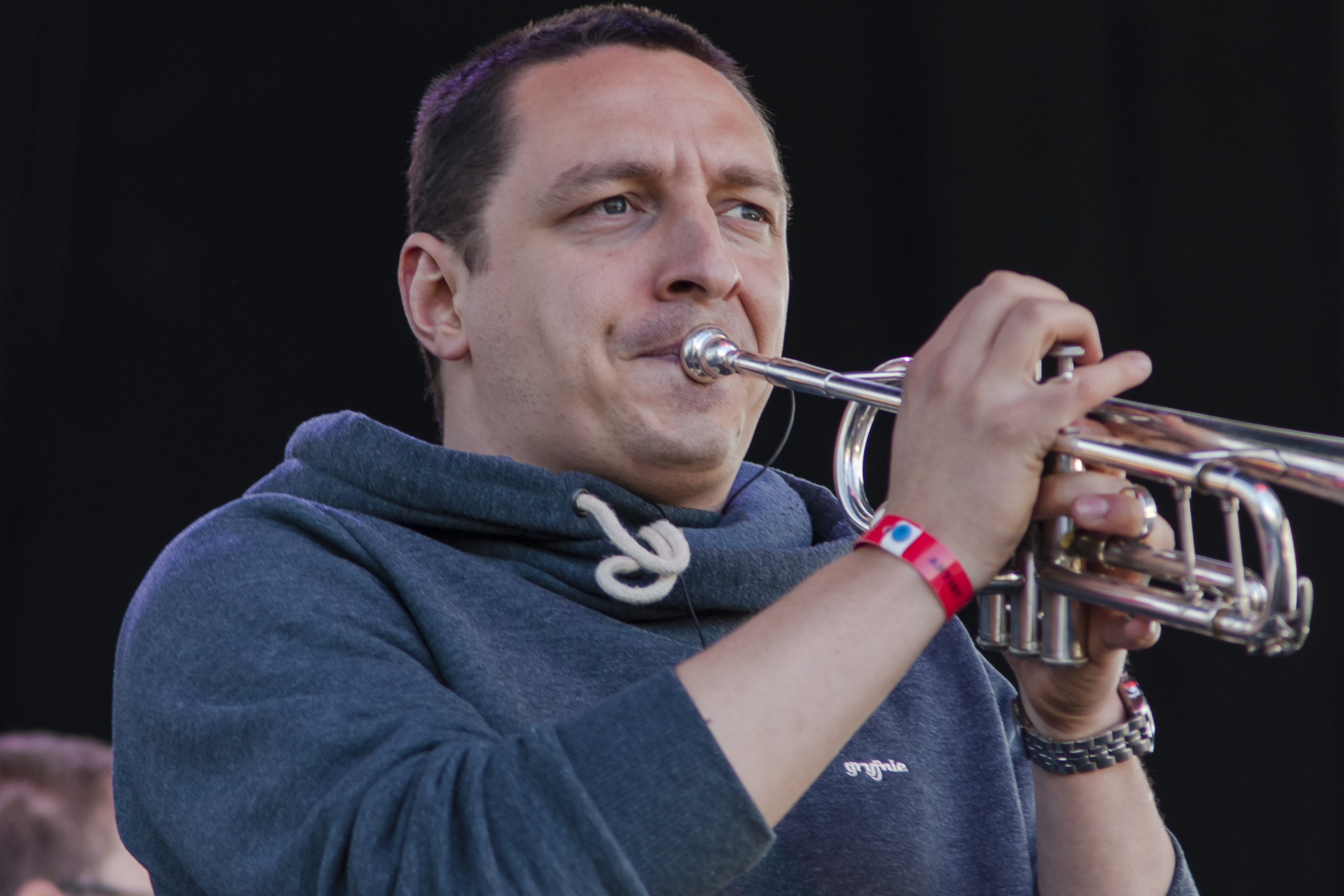 Szymon „Szymek” Cirbus z zespołu Koniec Świata na Festiwalu Ursynalia 2014